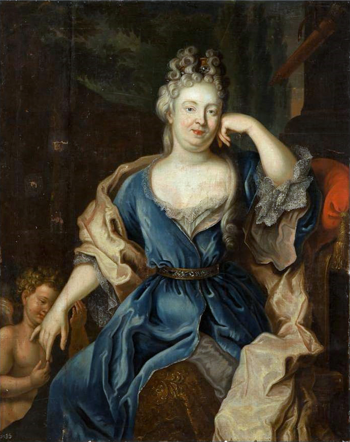 Беларуская (тарашкевіца): Партрэт Ганны Крыстыны Радзівіл (Hanna Krystyna Radzivił) зь Любамірскіх (Lubamirski)